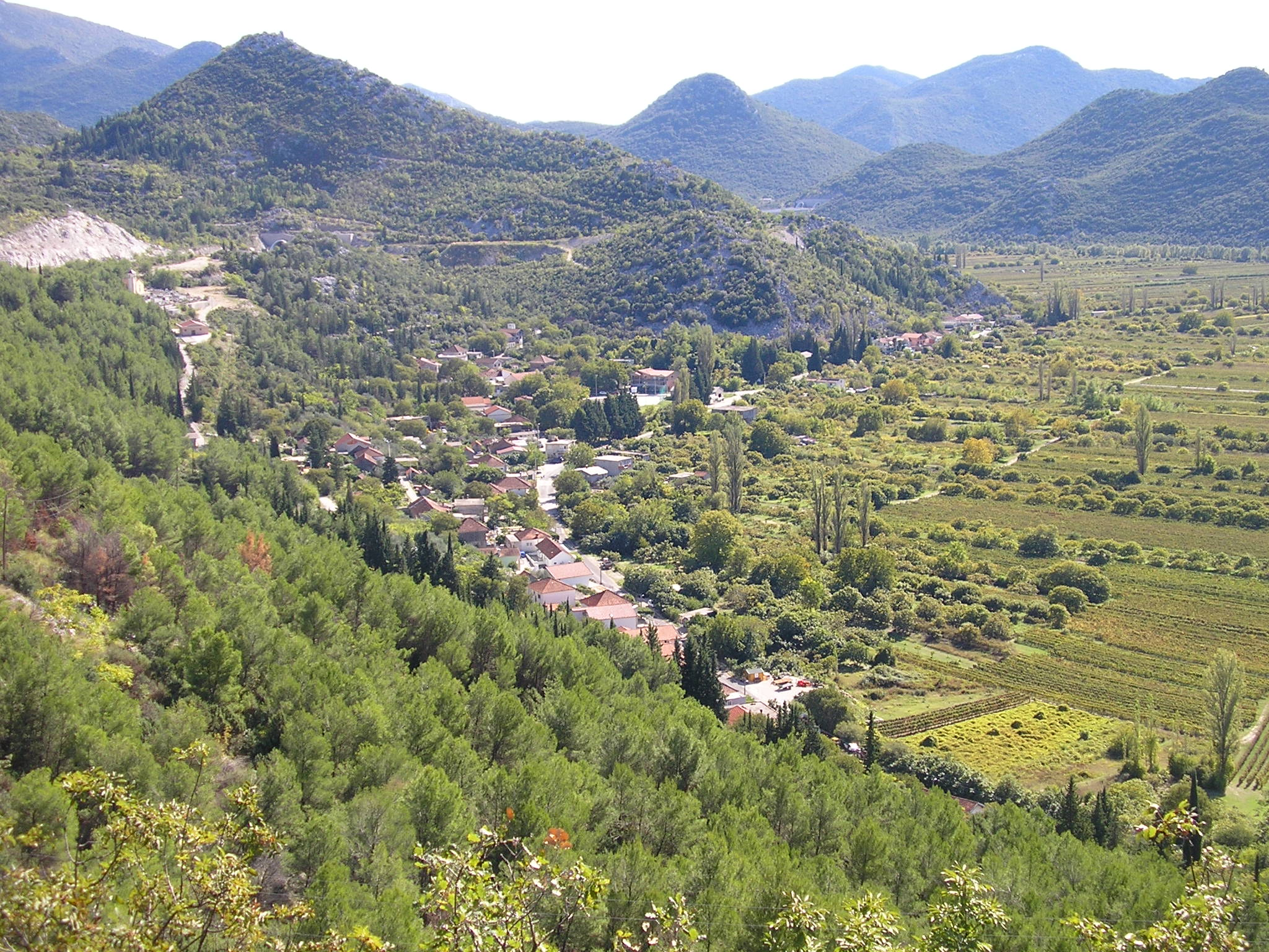 Kobiljača